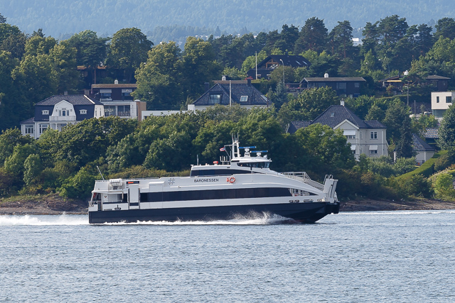 Katamaranen "Baronessen" i rute mellom Asker og Oslo.